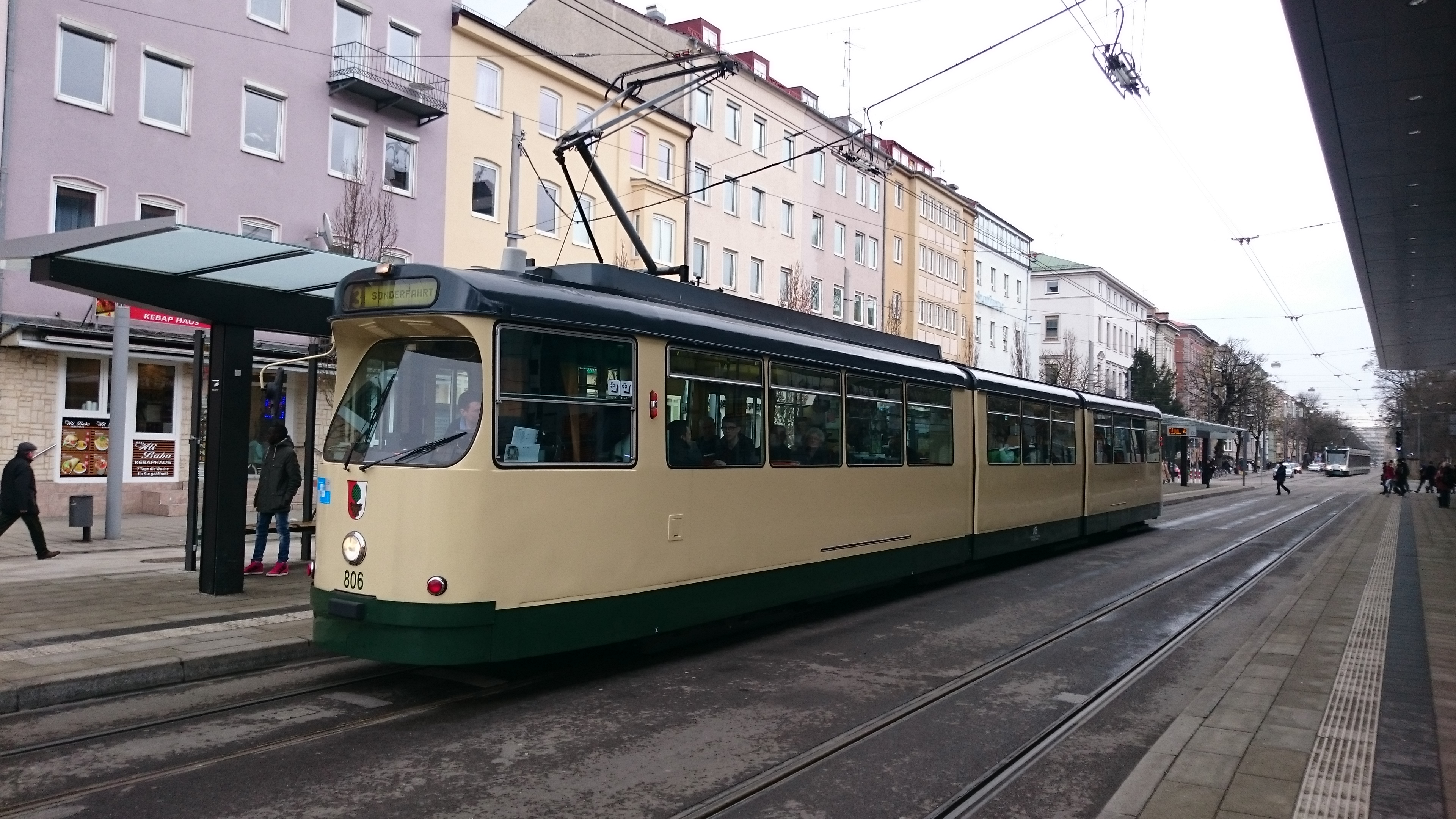 Eine Straßenbahn vom Typ Mannheim am Augsburger Königsplatz